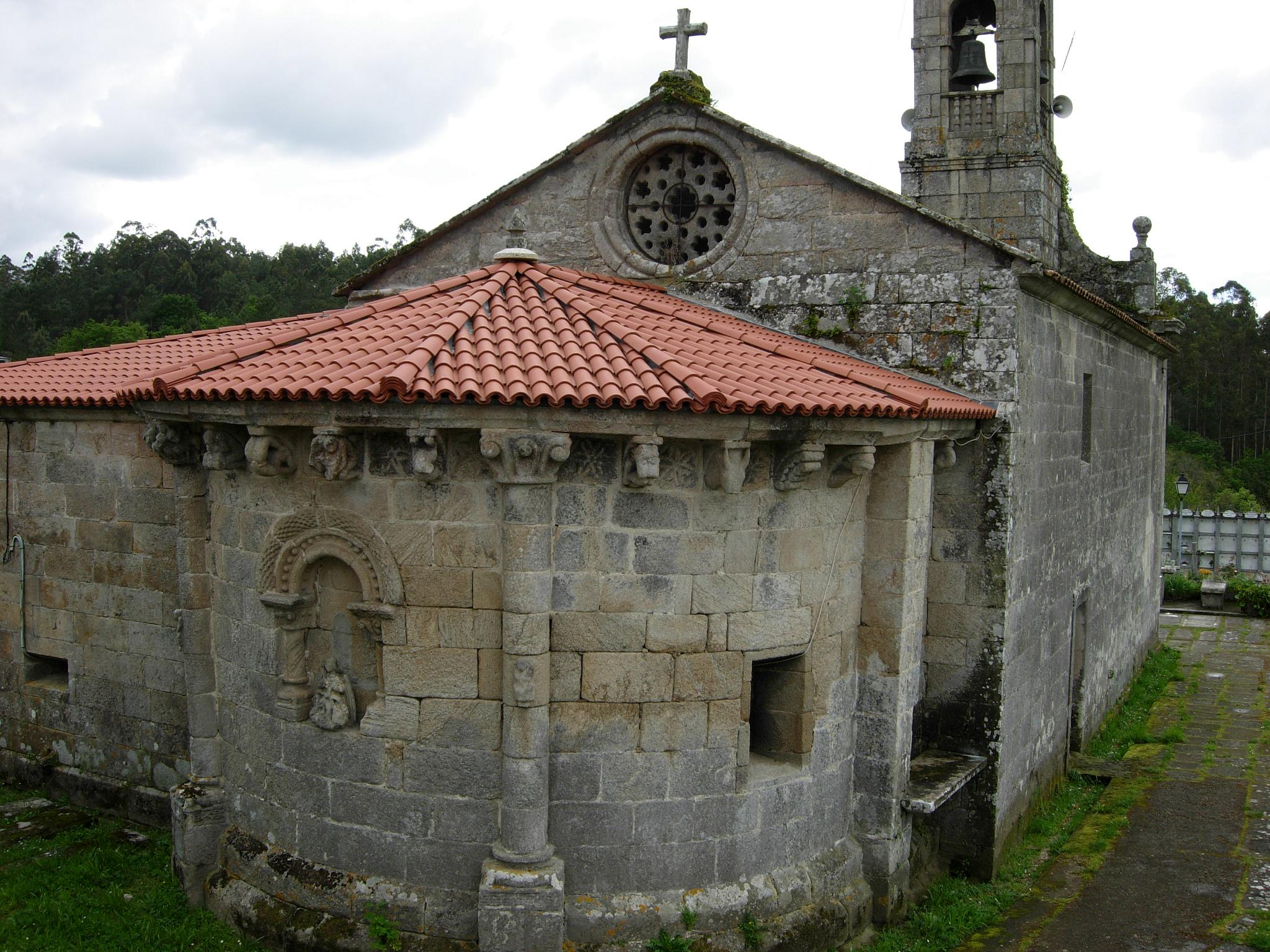 Igrexa de San Pedro de Rebón, no concello de Moraña